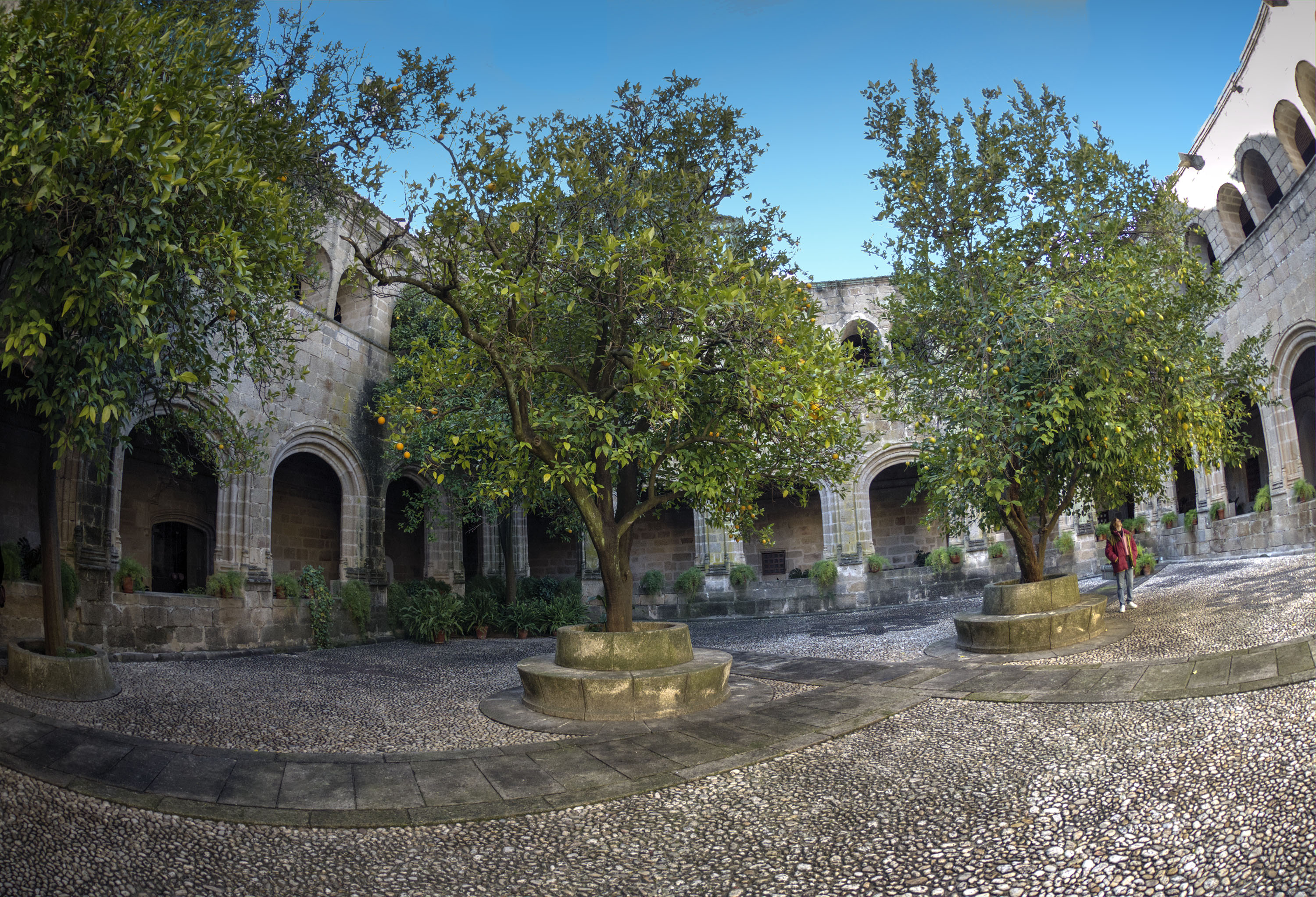 Claustro